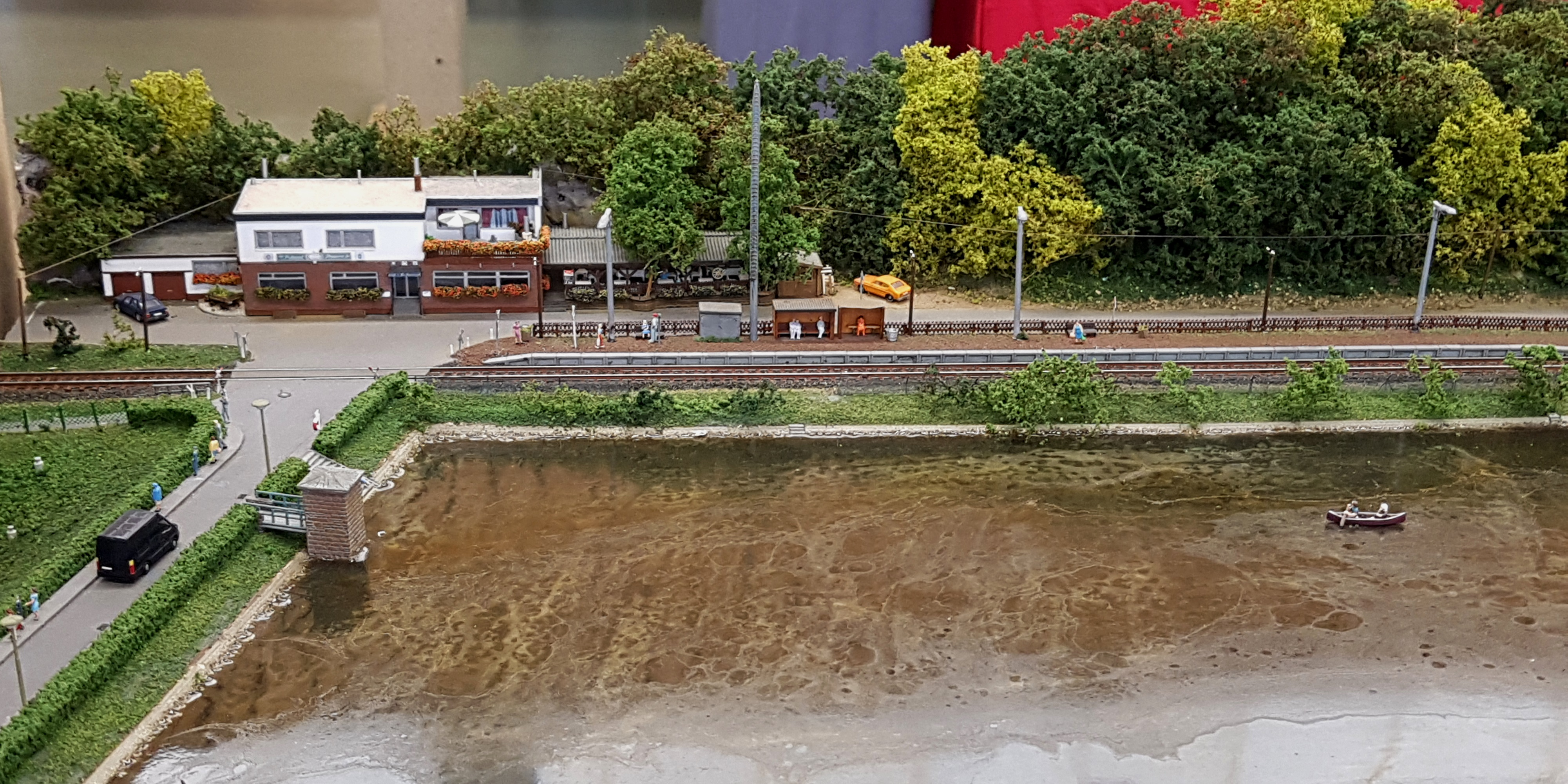 N-Modell des Rurtalbahn-Haltepunkts Obermaubach mit Rur-Stausee und Ausflugslokal, Zustand Mitte der 1990er-Jahre, erbaut durch den Verein "Modellbahnfreunde Düren", jetzt Modelleisenbahn-Gemeinschaft Kerpen-Düren e.V., Ausstellung des Vereins "Euregio Spur Null" in der Rurauenhalle Linnich-Tetz am 7. Oktober 2018